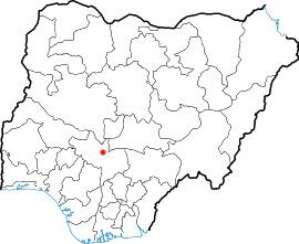 Localização de Lokoja na Nigéria.